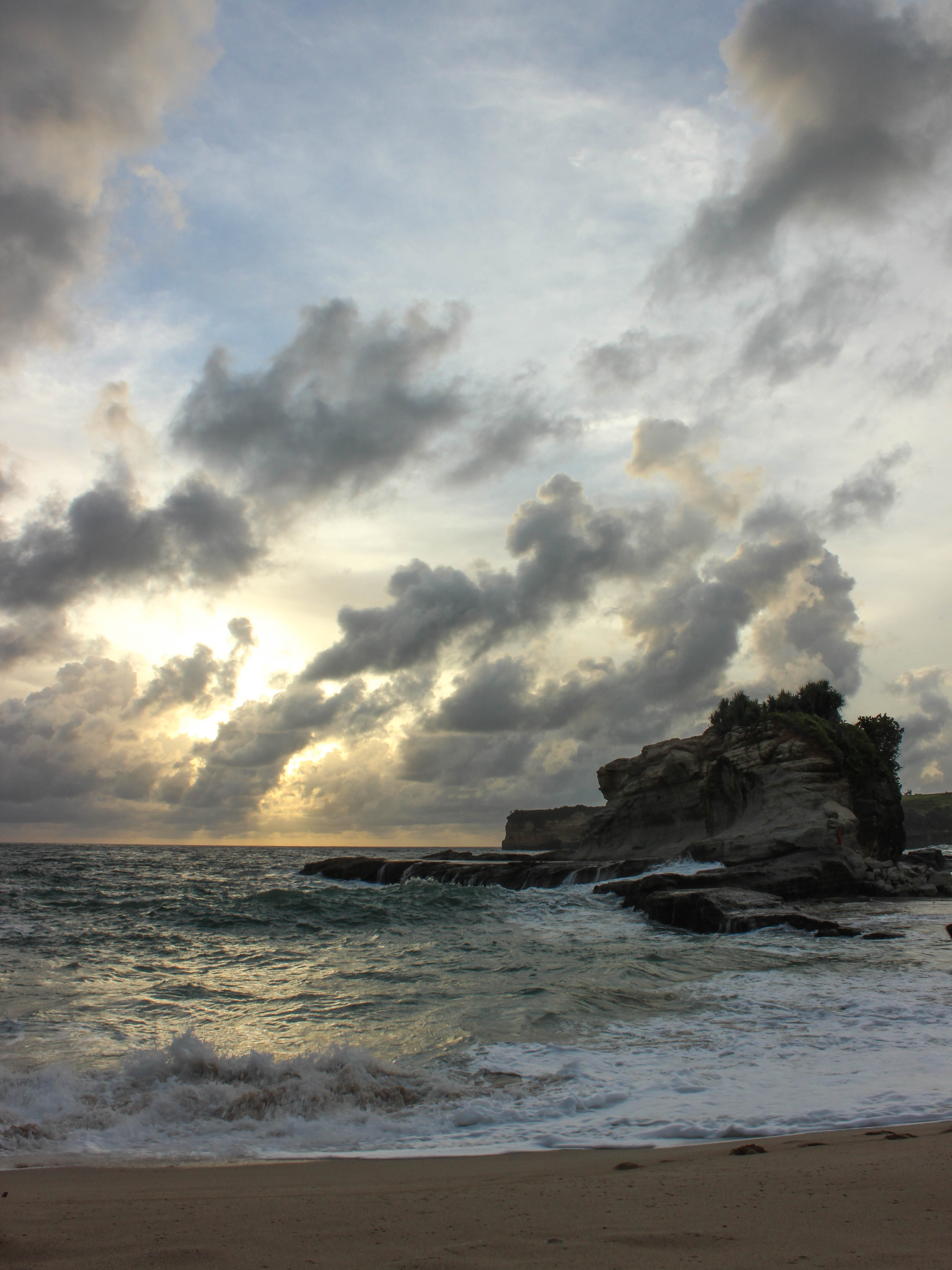 Menunggu matahari tenggelam di pantai Klayar. Meskipun terkenal dengan julukan 'kota 1001 goa', kabupaten Pacitan juga mempunyai andalan bentang alam berupa pantai pasir putih dengan ombak khas Samudera Hindia.